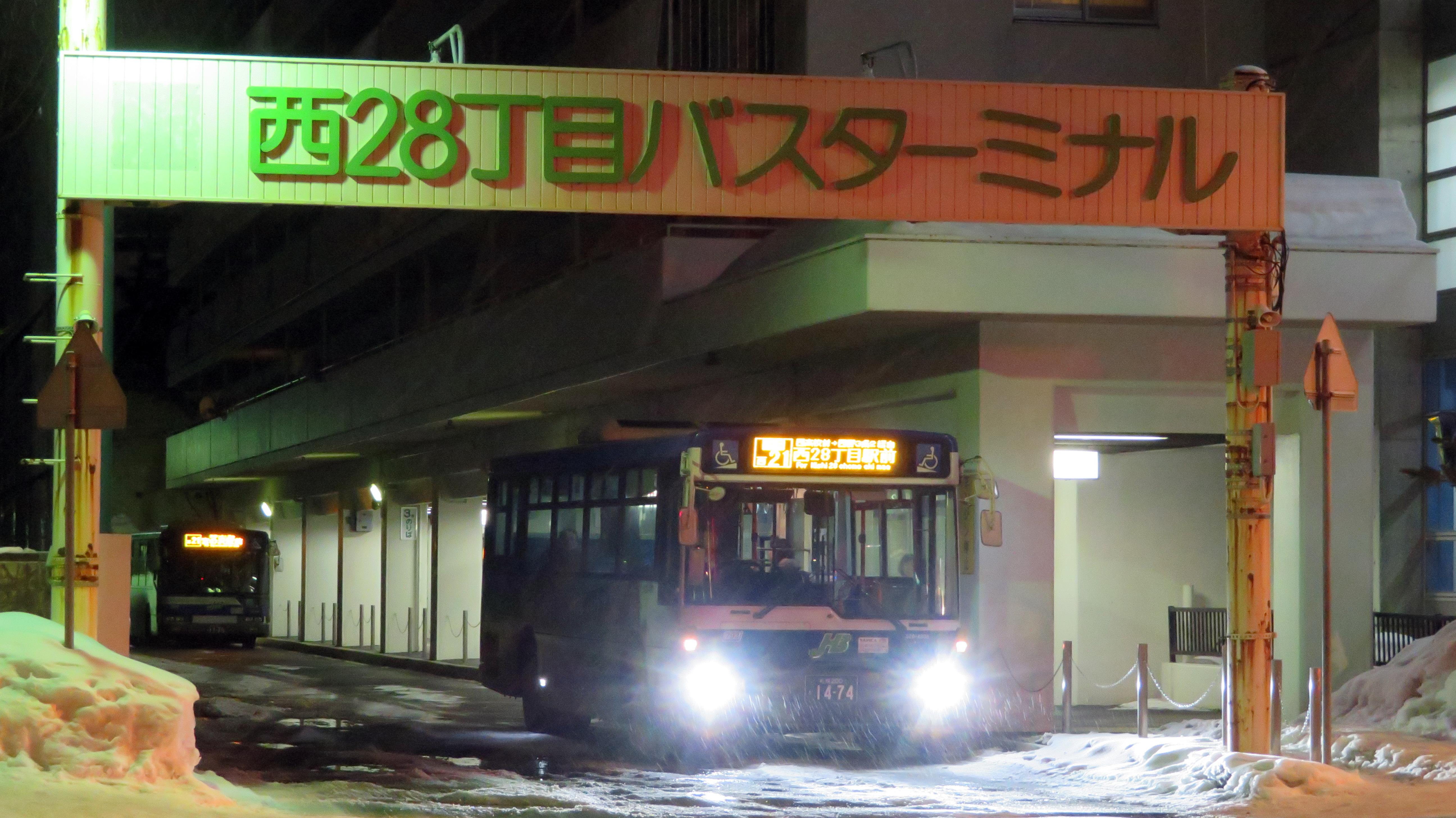 西28丁目バスターミナル Canon PowerShot SX720 HS